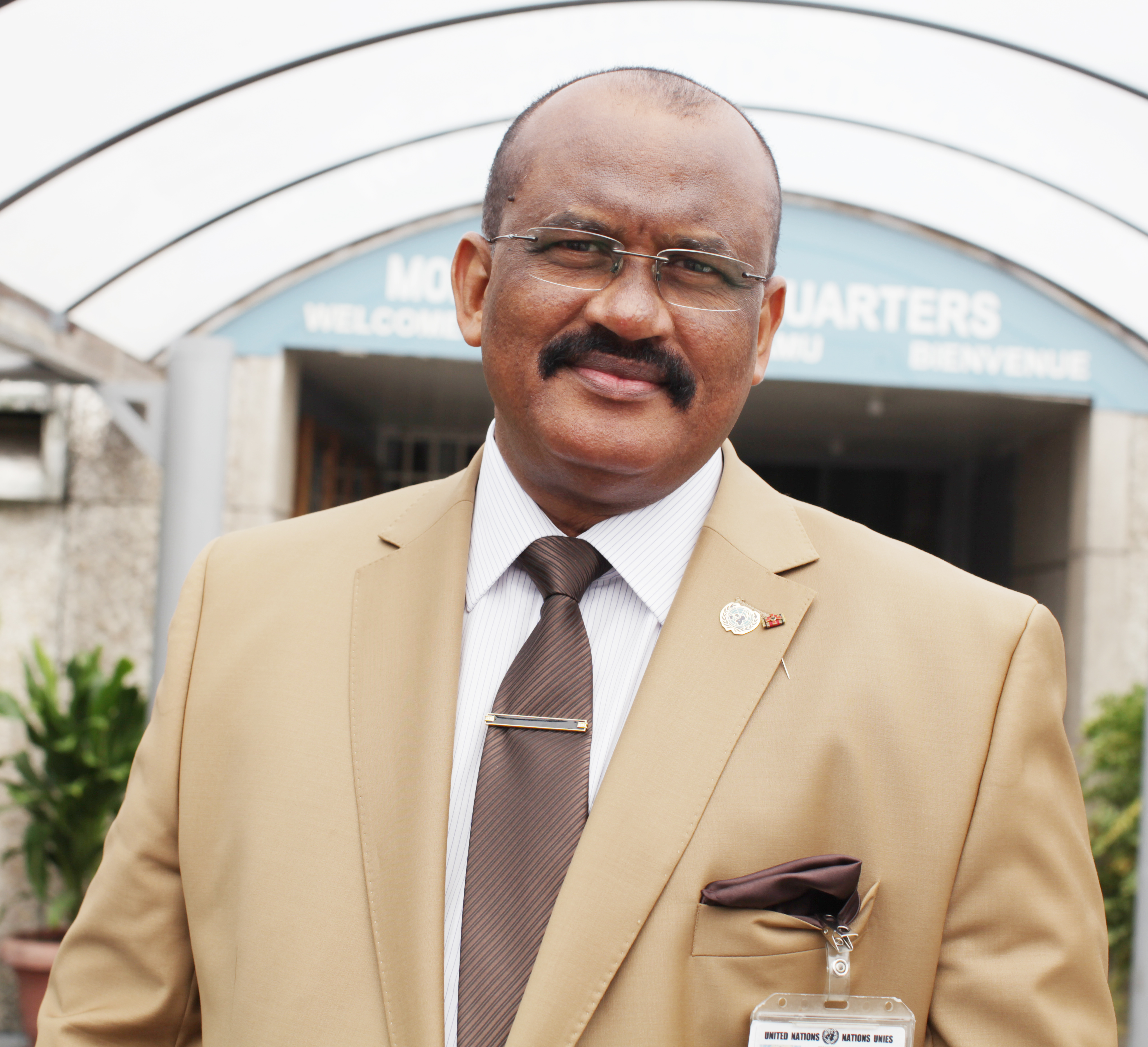 DRC Kinshasa 04/06/13.MONUSCO DSRSG Abdallah Wafy.